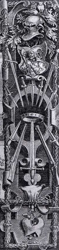 Зразок розвиненого бордюра в гравюрі Дірка Корнгерта Геракліт і Демокріт 1557 р.